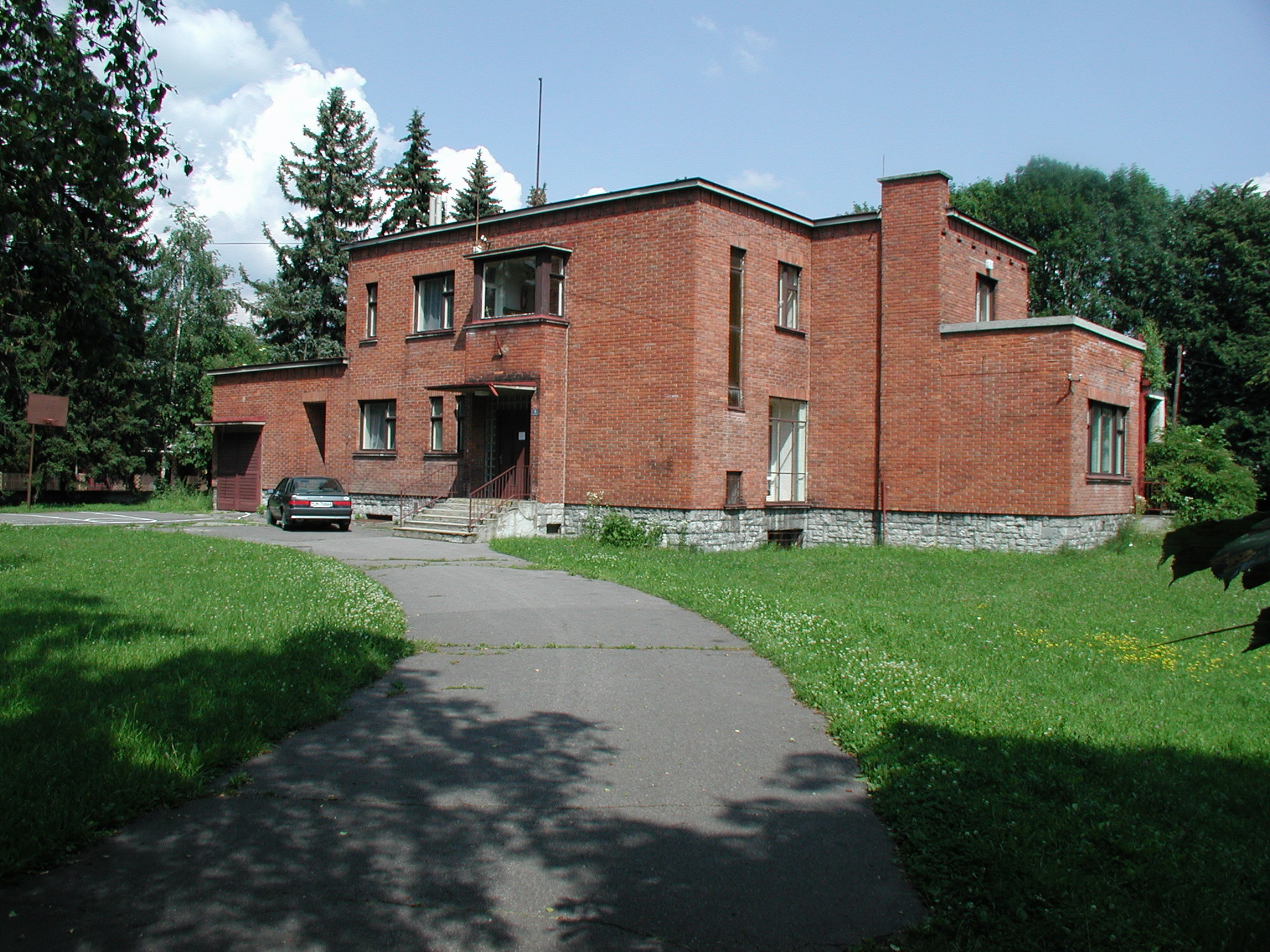 Pálkova vila, Liptovský Mikuláš